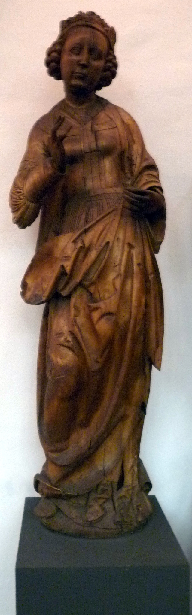 Heilige Ursula Meister der Heilsbronner Marienkrönung, um 1525 Aus der Zisterzienserklosterkirche Heilsbronn